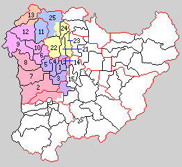 奈良県葛下郡・広瀬郡（後の北葛城郡）の町村制時点の町村。